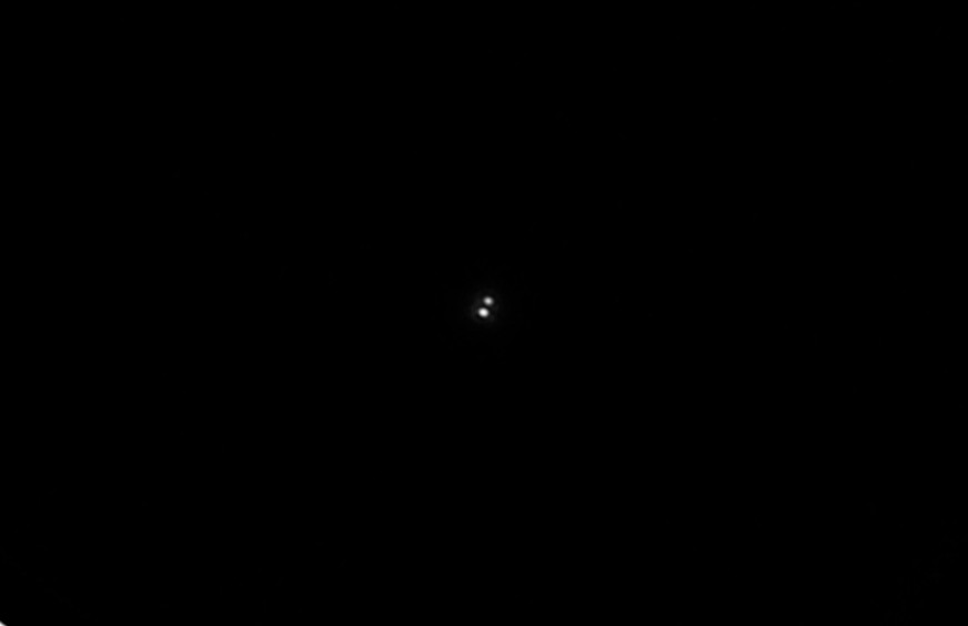 Image prise en date du 30 avril 2019 avec lunette apochromatique LZOS 150/1200 et Barlow 3X avec camera CCD ZWO ASI 224MC.(θ):156.6° (ρ):2.1" d'arc.